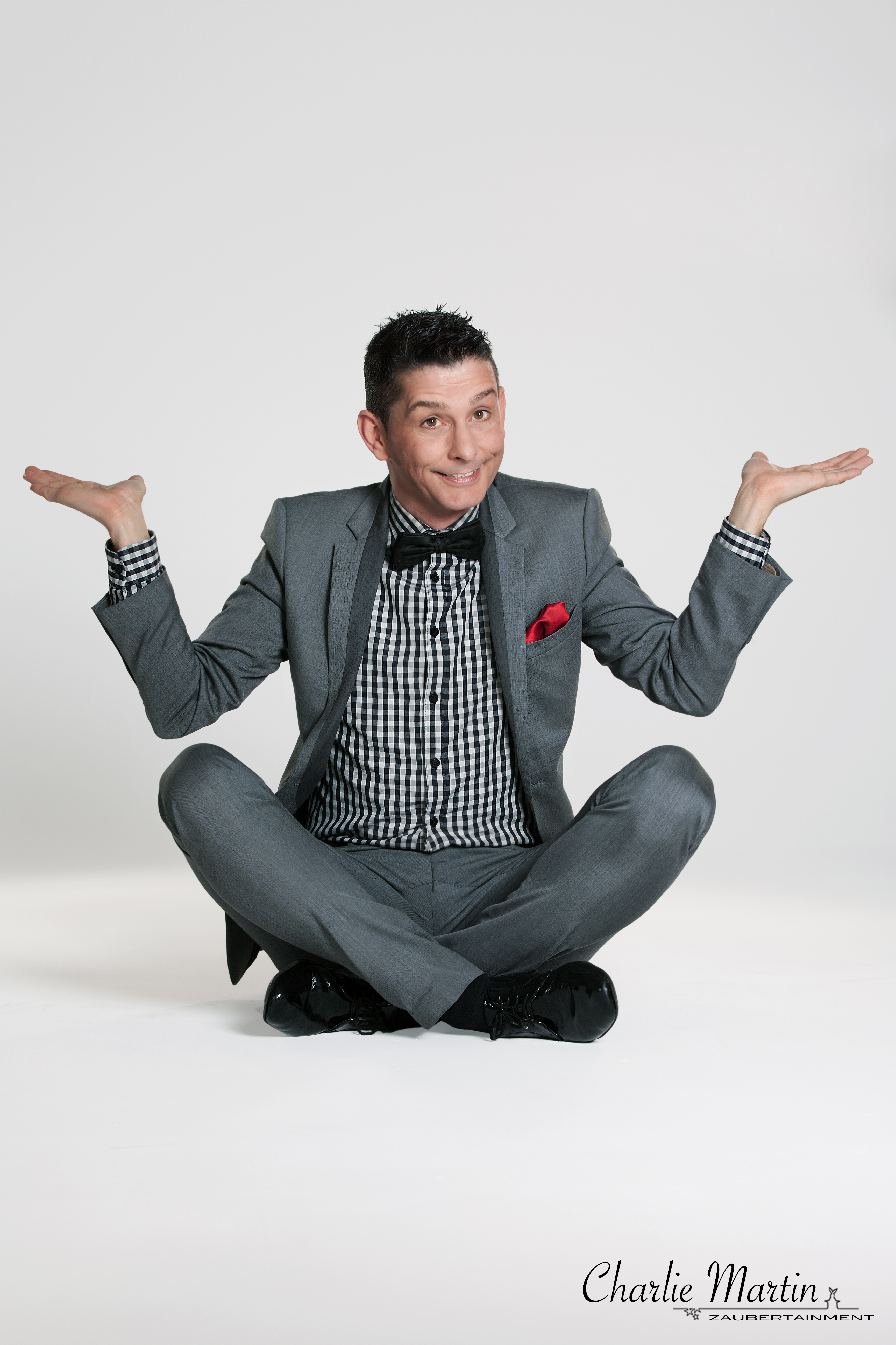 Charlie Martin zaubertainment , Autogrammkarte von 2015